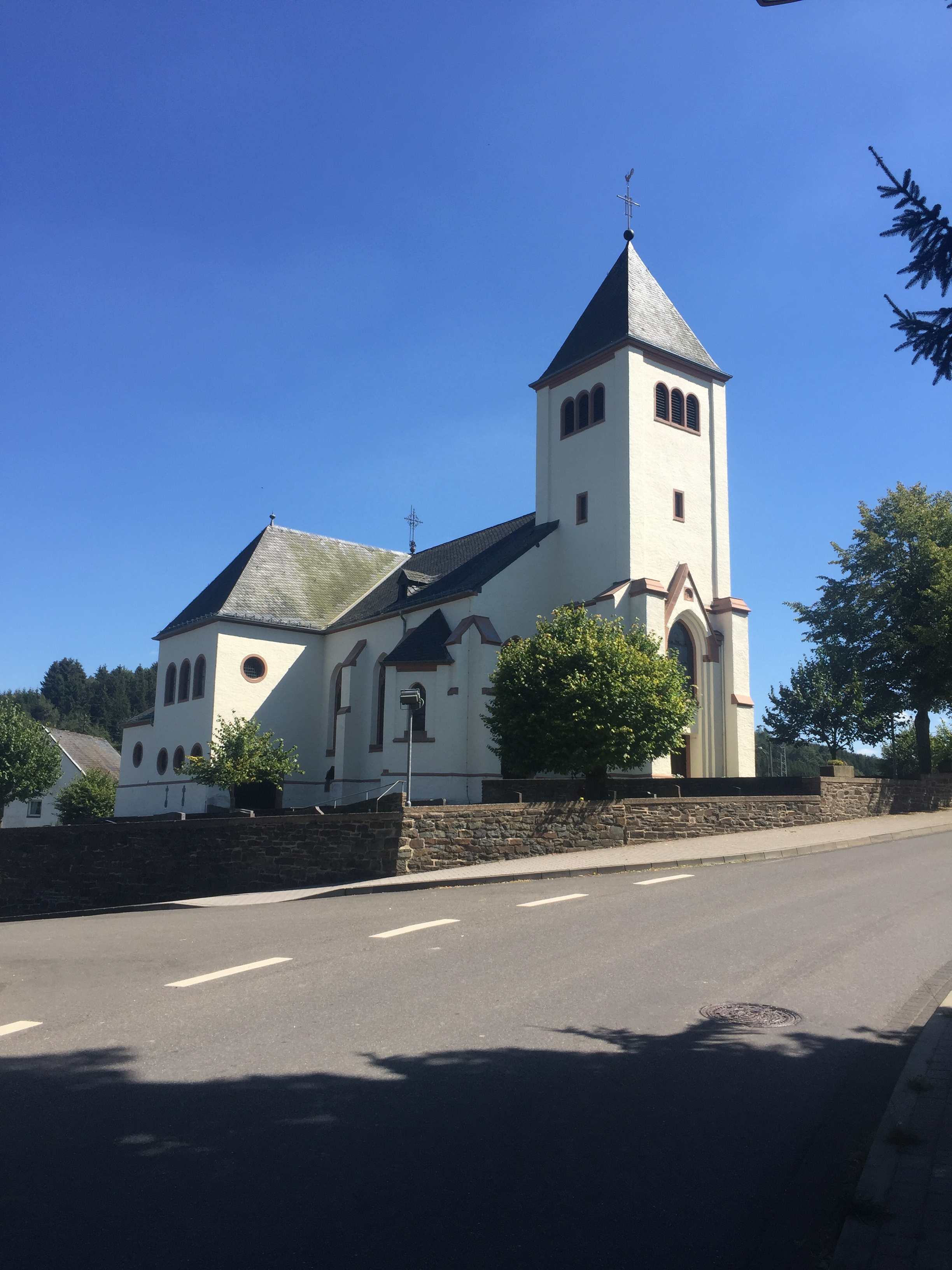 Iglesia en Hallschlag.